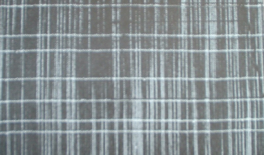 Inbetween: Kettengewirk mit einglegtem Schuss